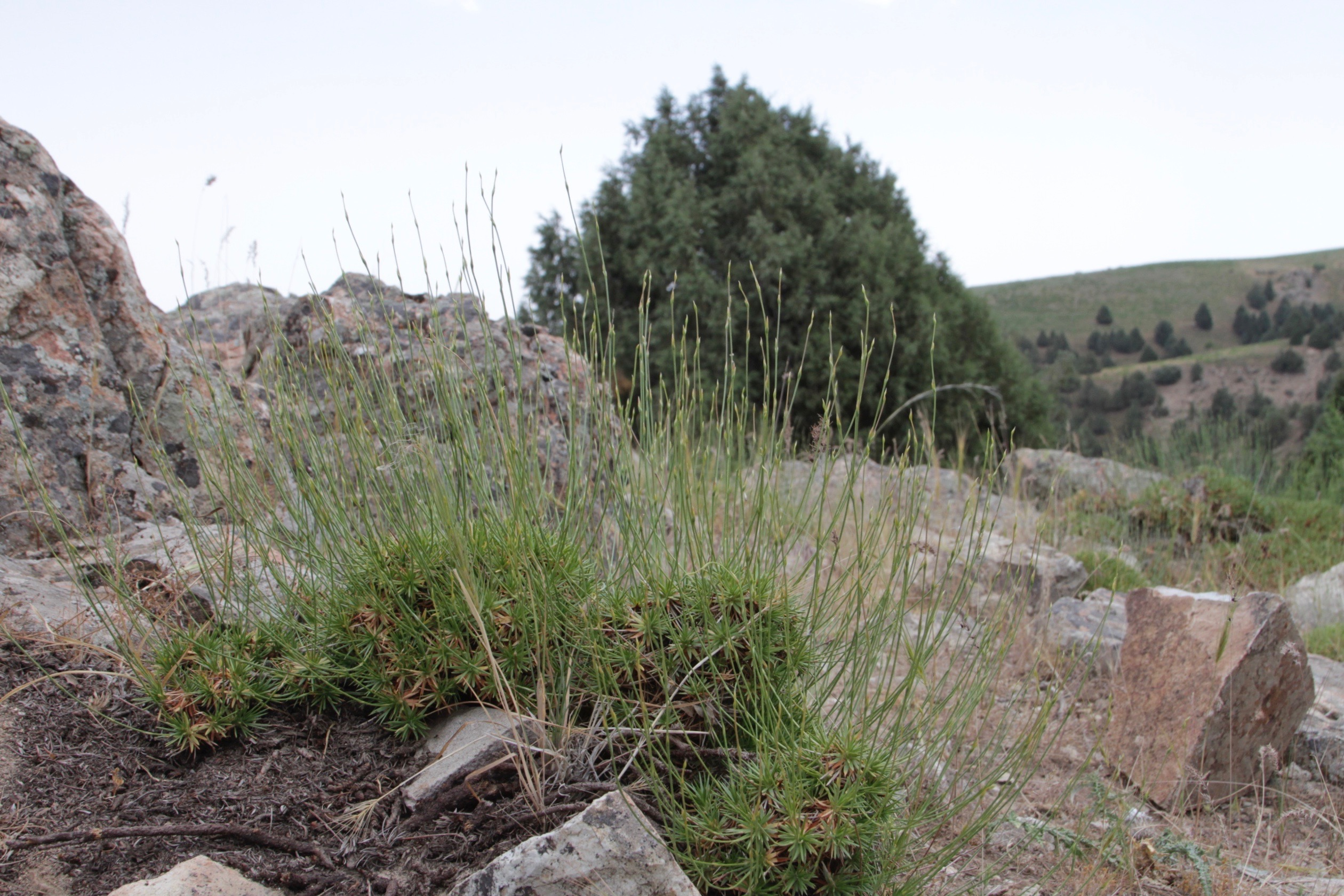 Uzbekistan, Kugitang range, Surkhanskiy Nature Reserve. Rus: Узбекистан, Сурхандарьинская обл., Шерабадский р-н, вост. склон хр. Кугитангтау, Сурханский государственный заповедник.